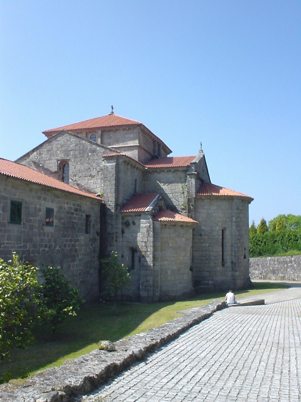 KlosterArmenteira, Galicien, Spanien